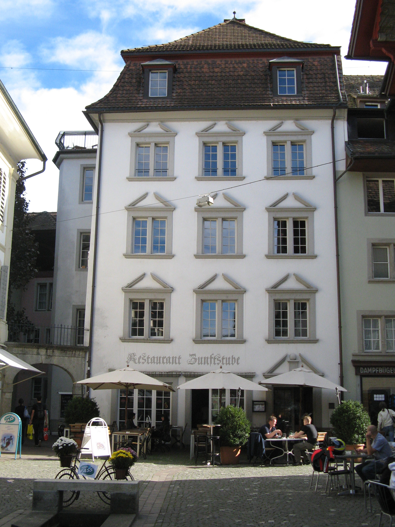 Restaurant Zunftstube, Aarau